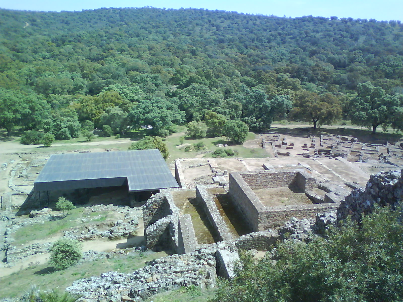 Templo de Podium, situado en la segunda terraza, Munigua.